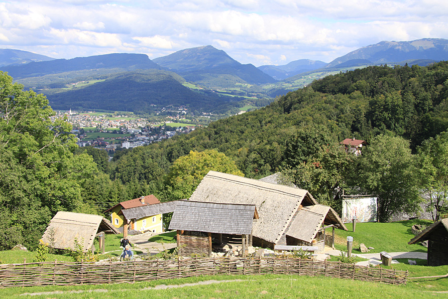 Das Keltendorf in Bad Dürrnberg